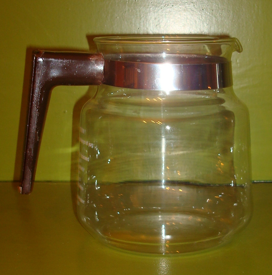 Kaffekolbe i glass med hank i plast. Høyde 14.5 cm.